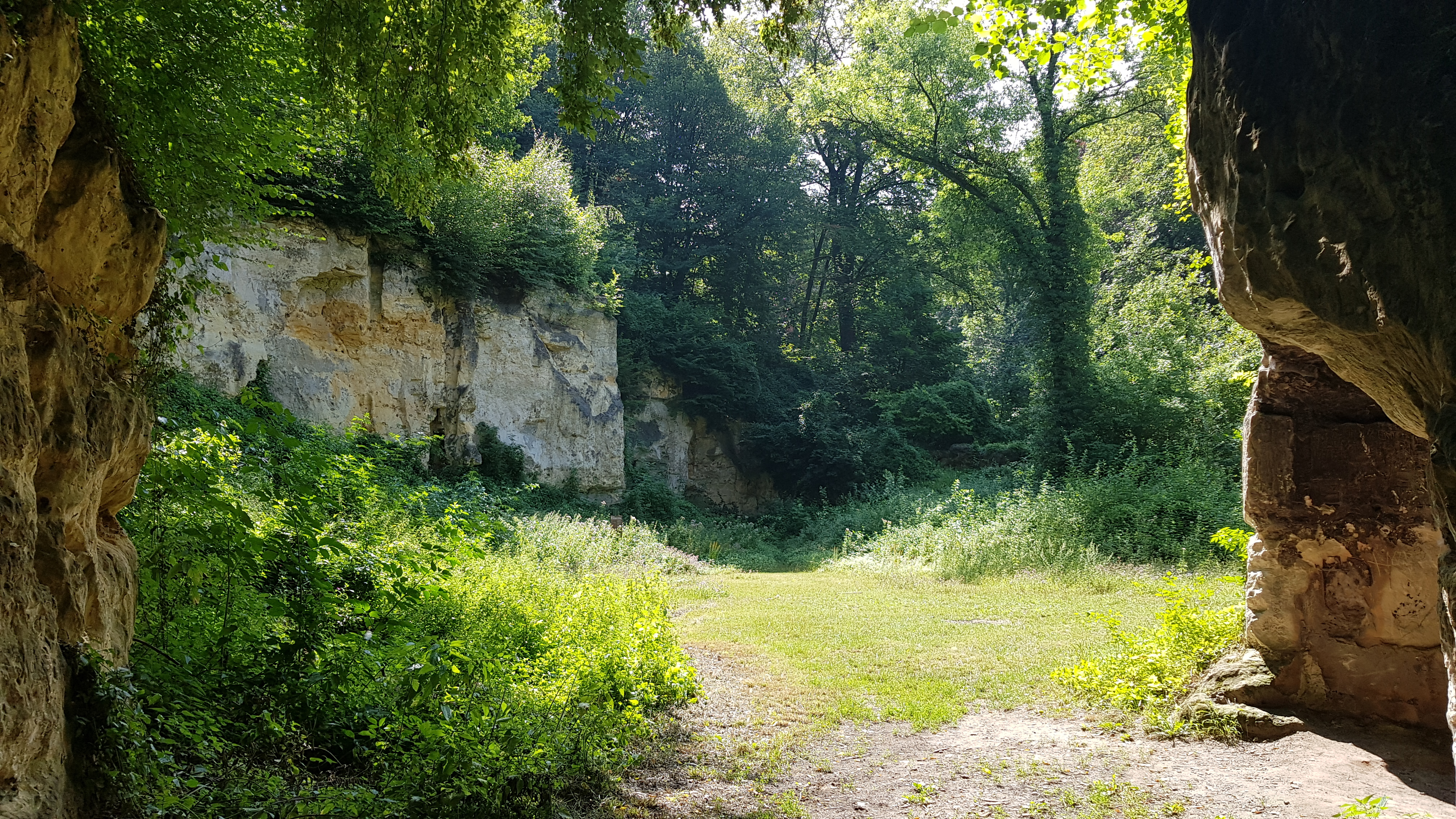 Geologisch Monument Groeve Trichterberg, Savelsbos, Gronsveld, Nederland